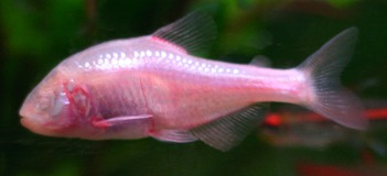 Blinder Höhlensalmler